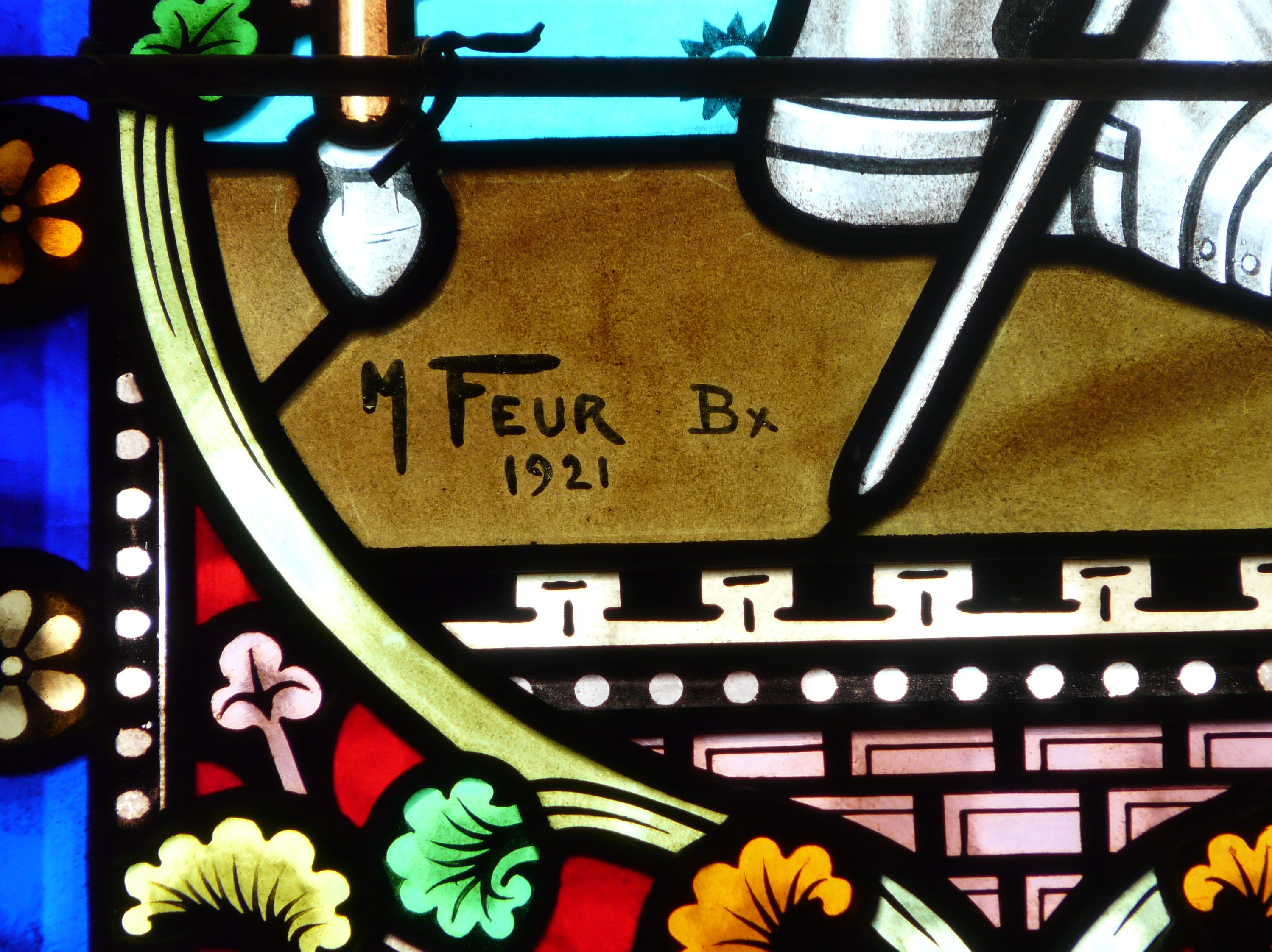 Signature du maître verrier Marcel Feur sur un vitrail de l'église Notre-Dame de l'Assomption, Échourgnac, Dordogne, France. Marcel Feur (1872–1934) DescriptionFrench painter, glass artist and stained-glass artistDate of birth/death9 January 187228 September 1934Work period1904-1934Work locationBordeauxAuthority control : Q3288938